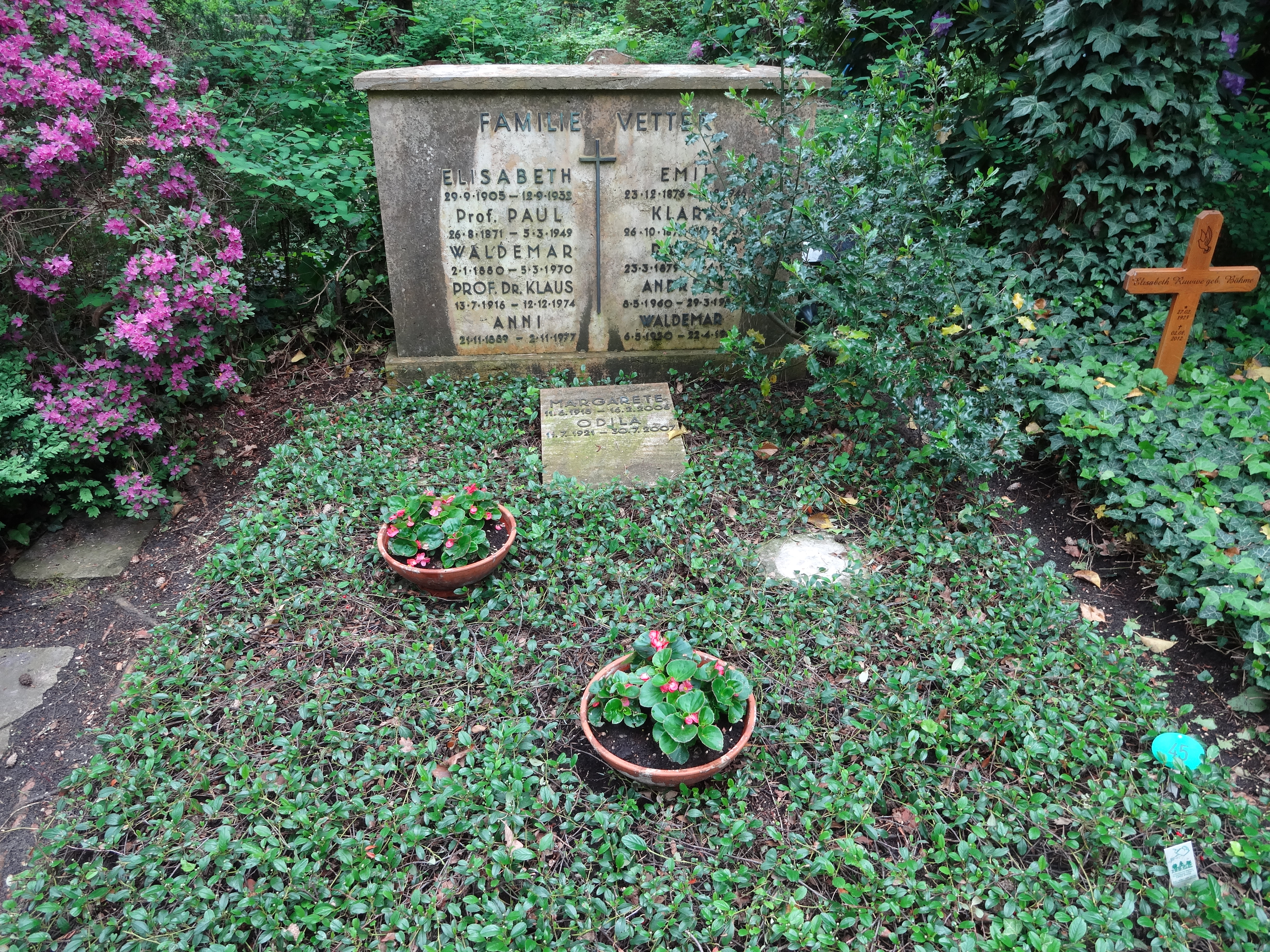 Grab von Prof. Klaus J. Vetter und Prof. Paul Vetter auf dem Friedhof Heerstraße in Berlin